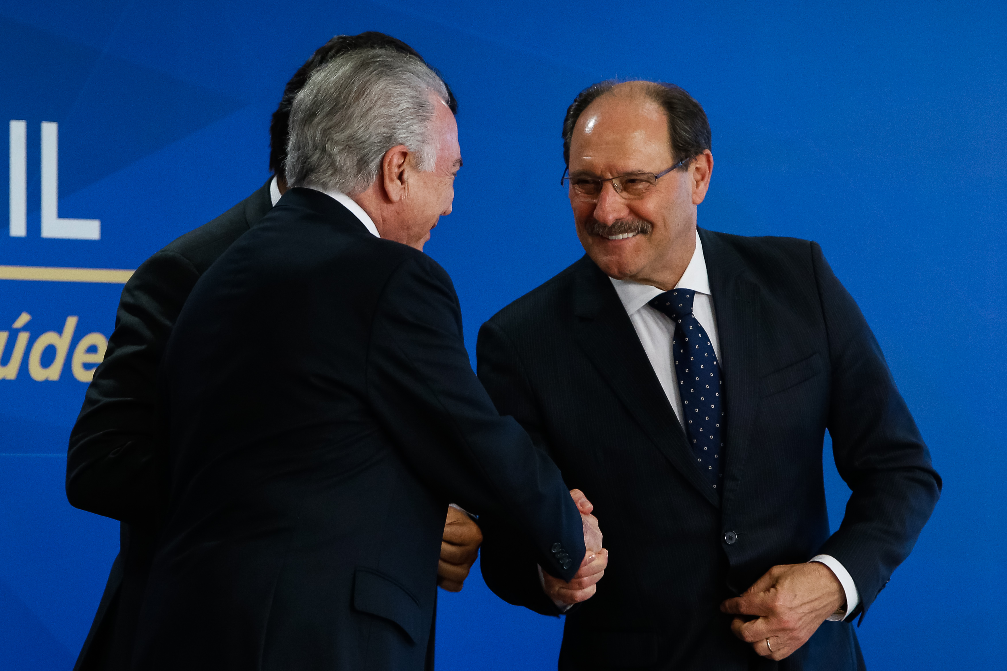 Michel Temer cumprimenta José Ivo Sartori em agosto de 2017.